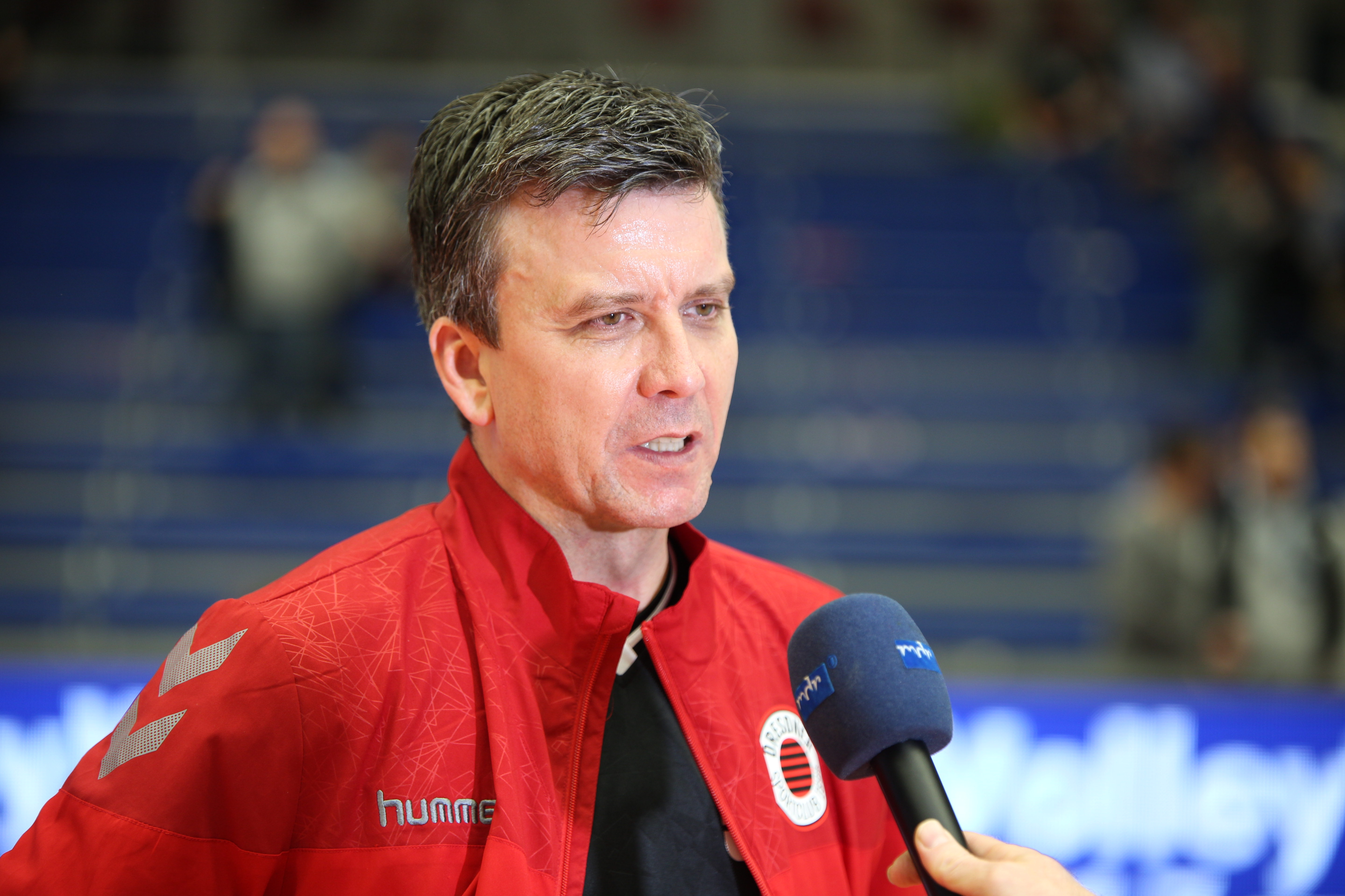 Alexander Waibl, Trainer Dresdner SC